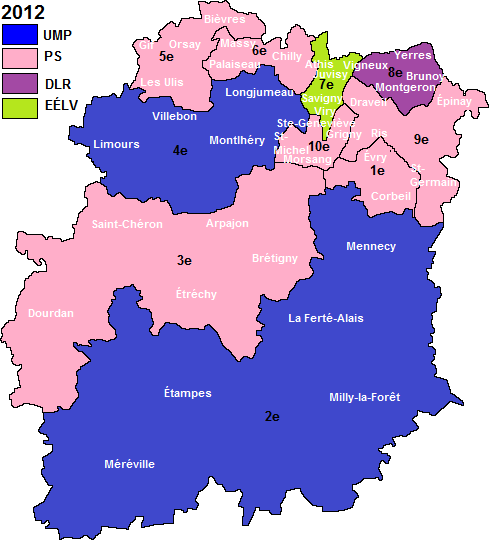 Carte de répartition politique des circonscriptions de l'Essonne à l'issue des élections législatives de juin 2012